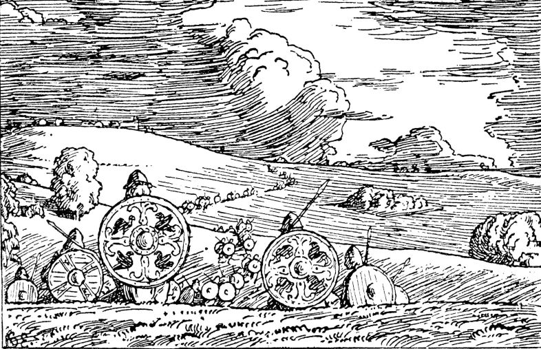 Halfdan Egedius: Illustration for Magnus den godes saga. Snorre 1899-edition. «Strax om Høsten bød Kong Magnus Leding ud over hele Trondhjem.» nb: «Straks om høsten bød kong Magnus leidang ut over hele Trondheimen.» nn: «Straks om hausten baud kong Magnus ut leidang over heile Trondheimen.»